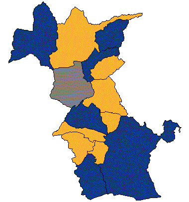 !Template:Llegenda}